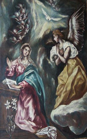 se conserva en la Catedral de Sigüenza